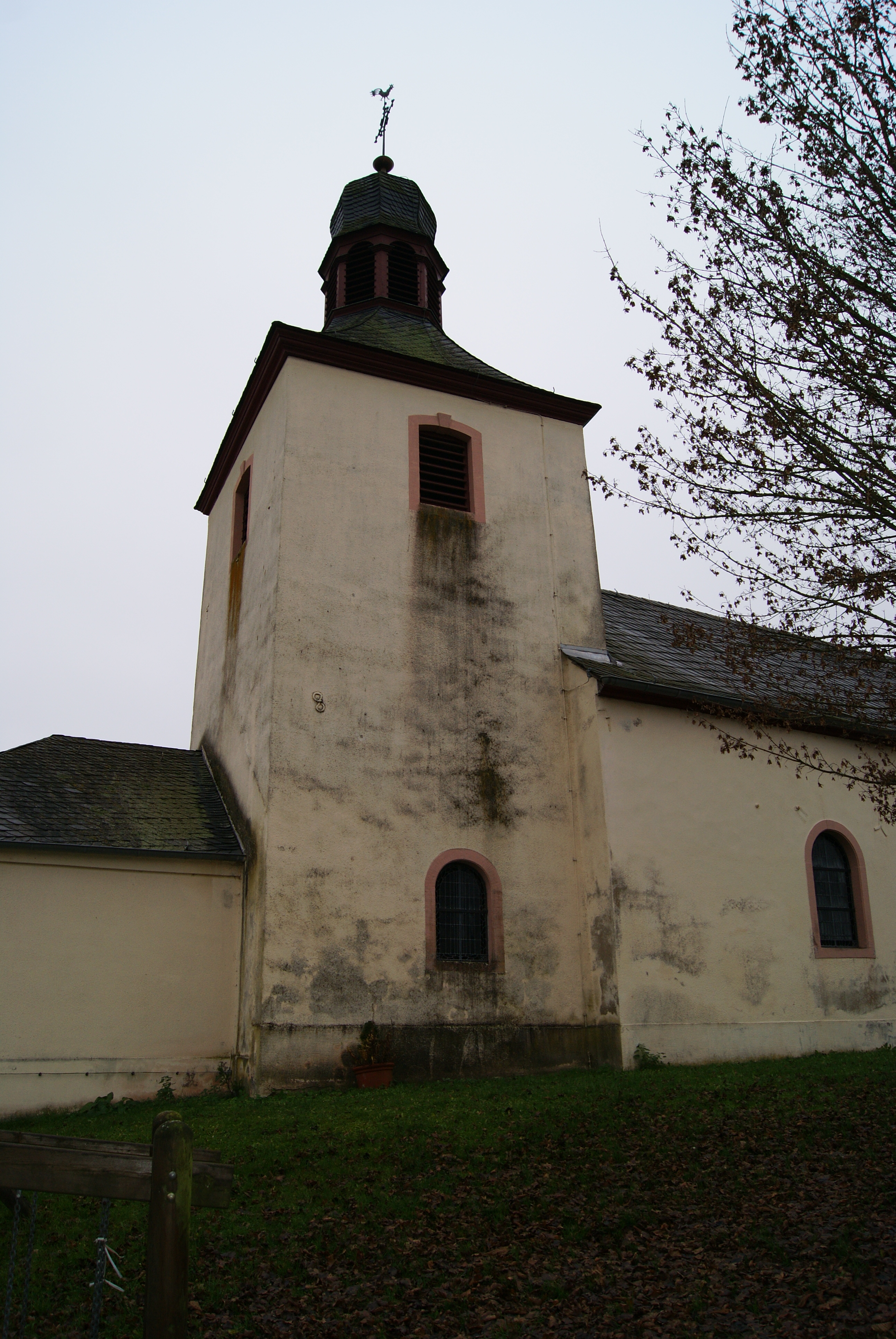 Katholische Filialkirche St. Johannes Baptist Sefferweich